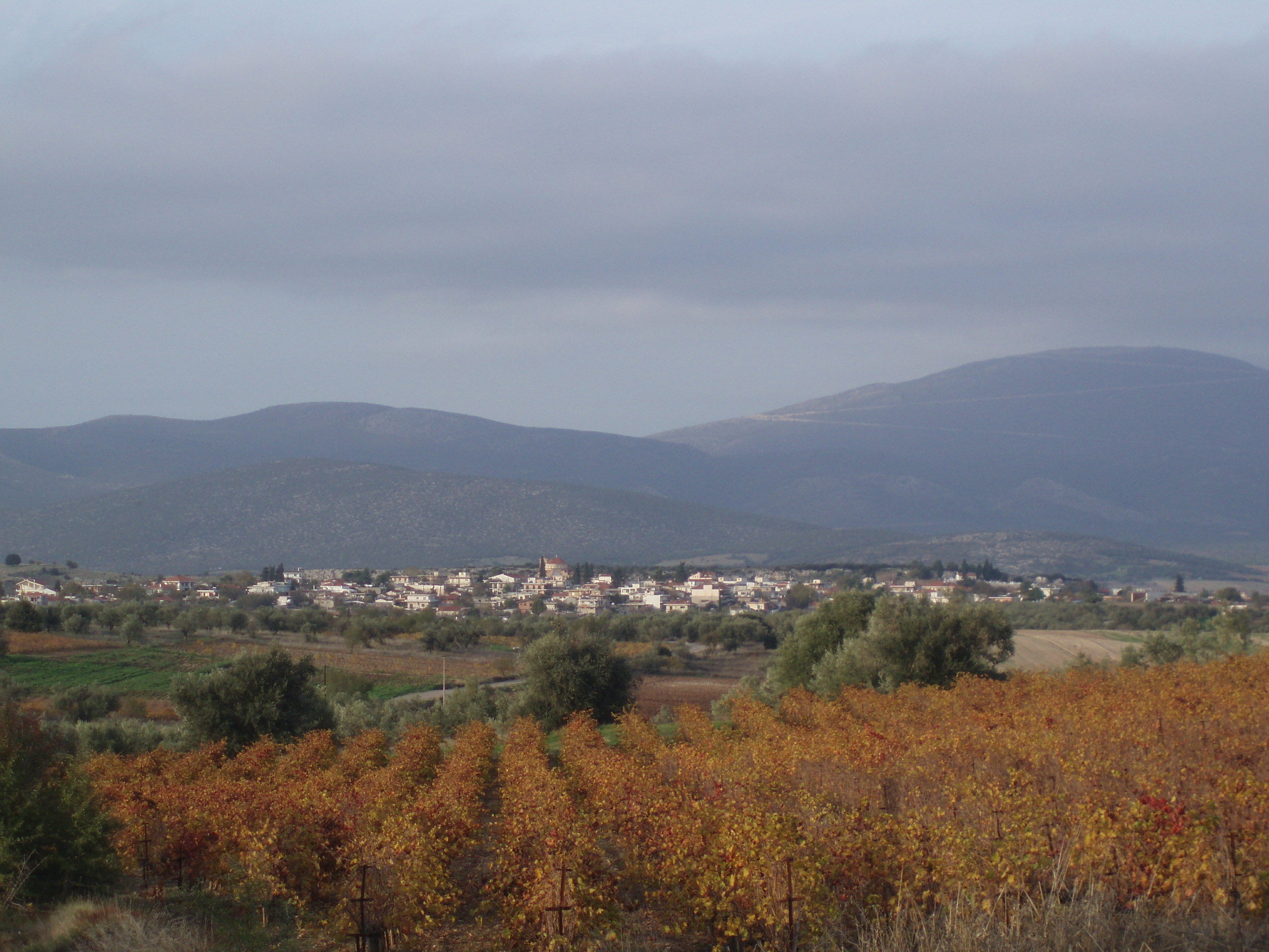 Northern view of Arma